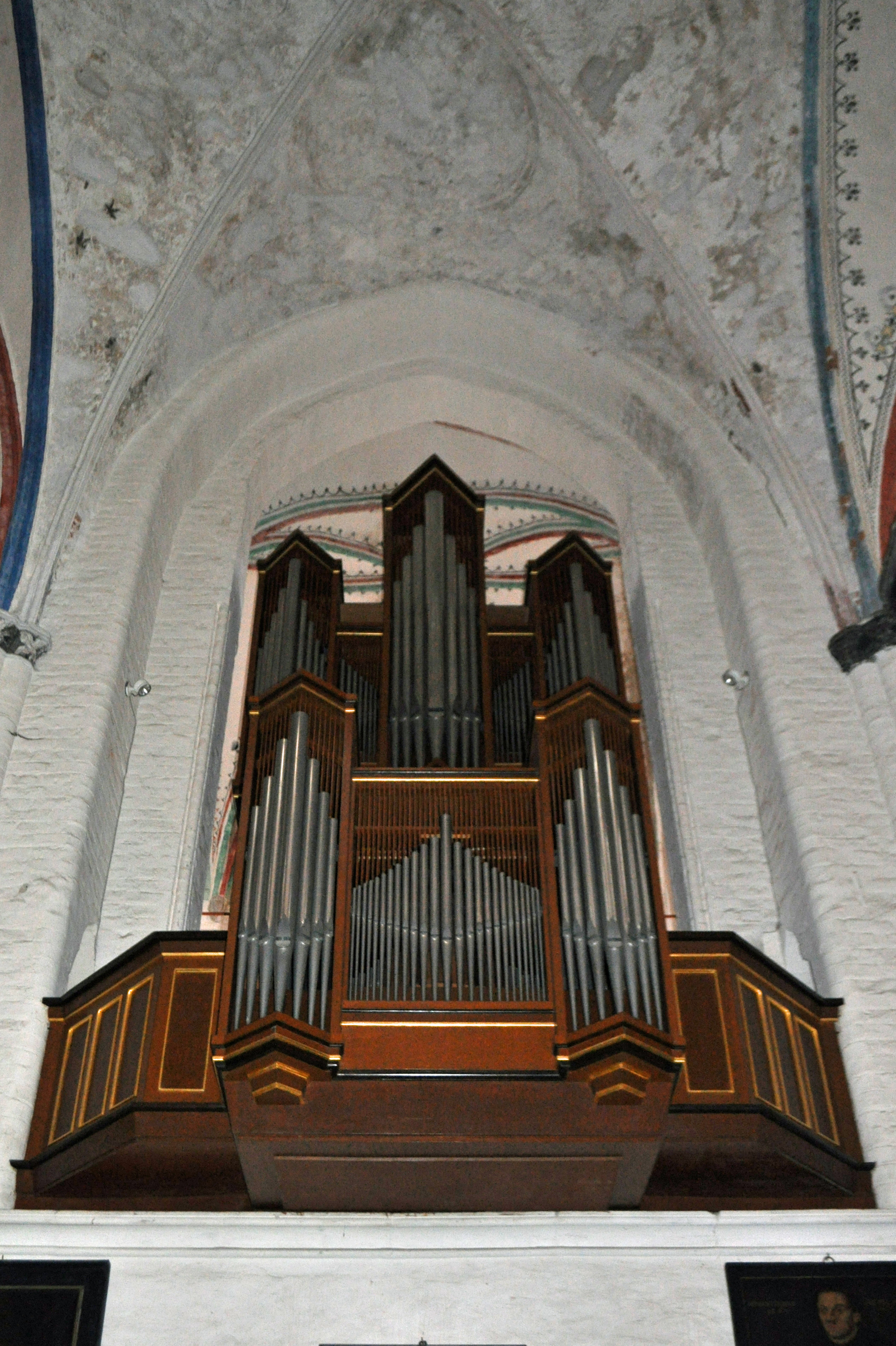 Stralsund, Nikolaikirche, Schuke-Orgel (2012-12-29), by Klugschnacker in Wikipedia